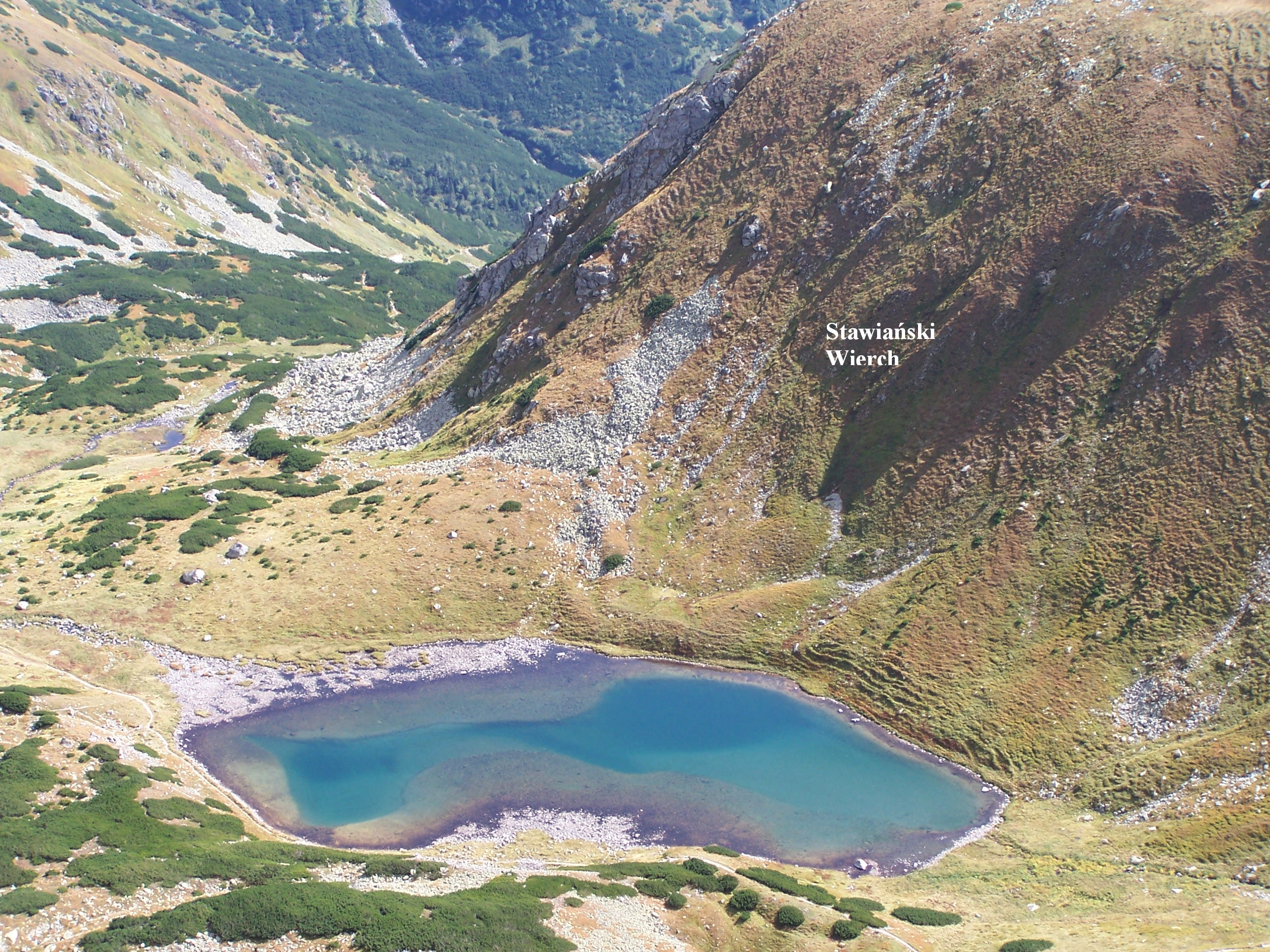 Niżni Jamnicki Staw (West Tatra Mountains)